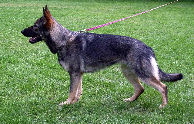 Standbild des Deutschen Schäferhundes "Graffiti" aus der Zuchtstätte "vom Neuenkirchenerdeich" (Homepage